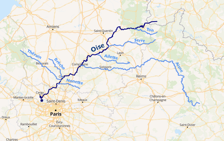 carte réalisée sur umap This map may be incomplete, and may contain errors. Don't rely solely on it for navigation.